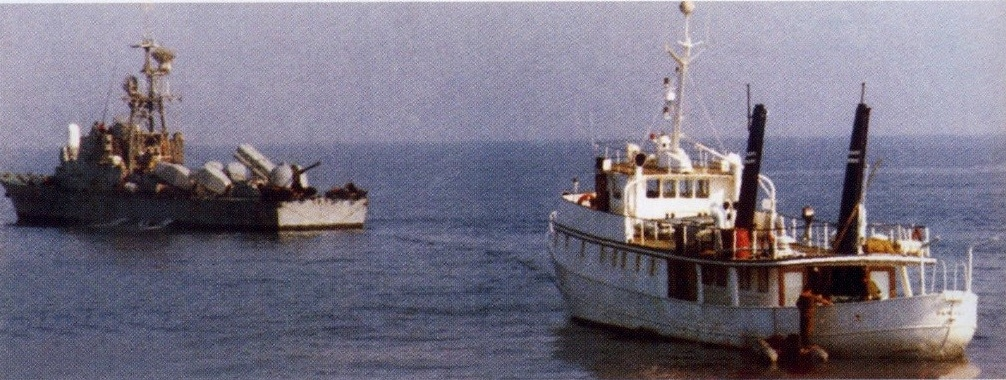 גרירת היכטה אנגל בשירות המחבלים הפלסטינים שנתפסה בלב ים